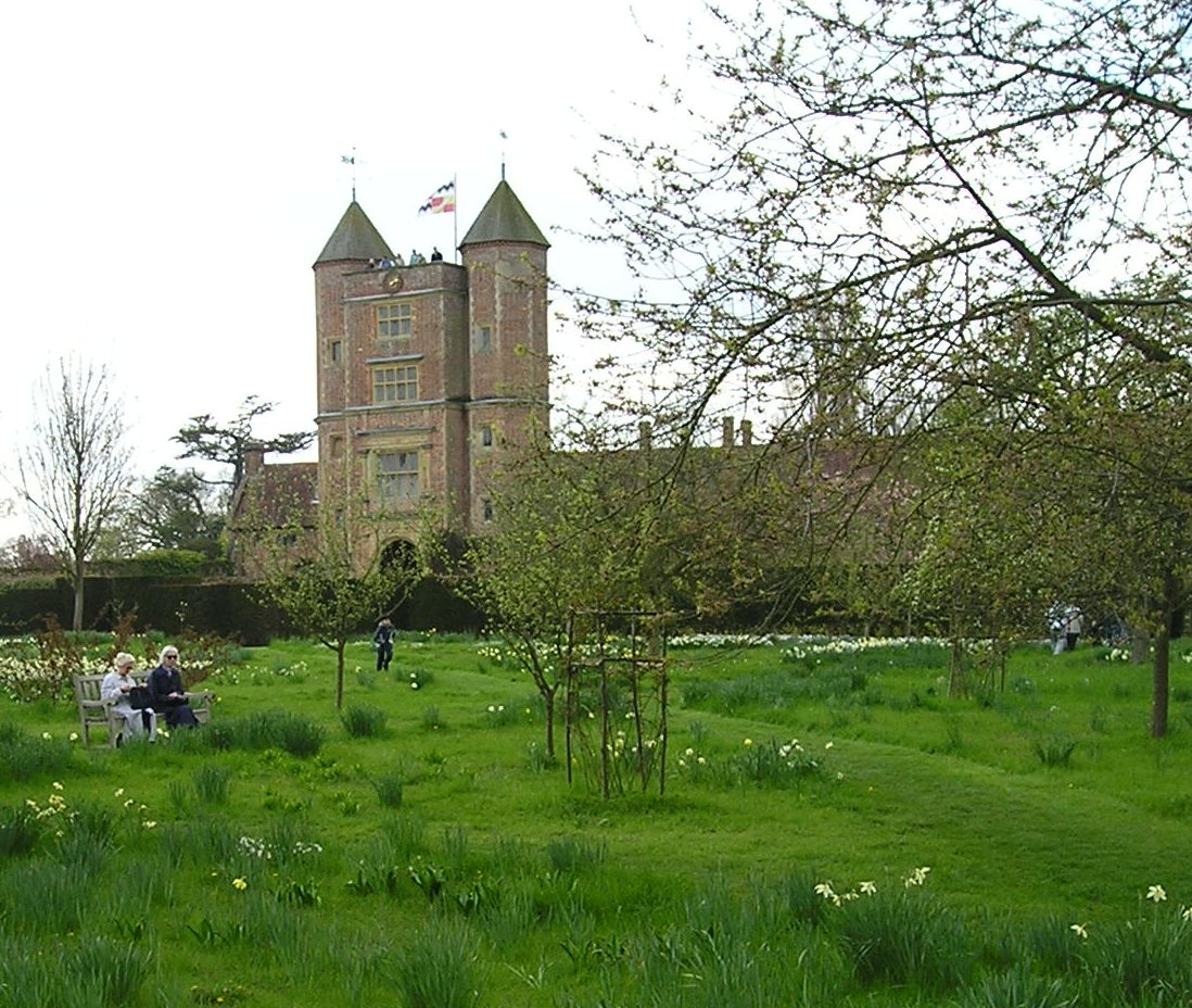 Sissinghurst garden, Kent, UK